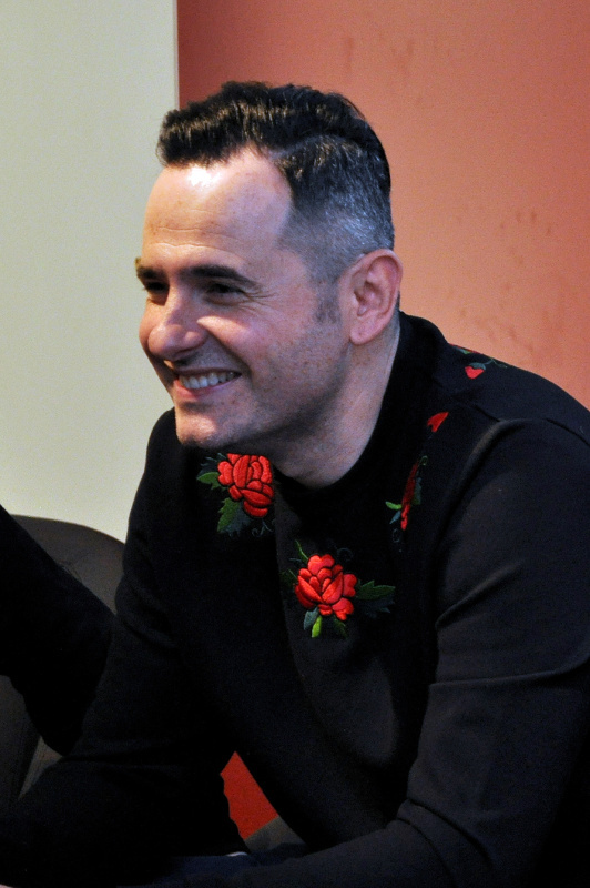 El actor y productor Luis Miguel Seguí en el acto de presentación en FNAC del DVD "Del lado del verano" (6 de Marzo de 2014).